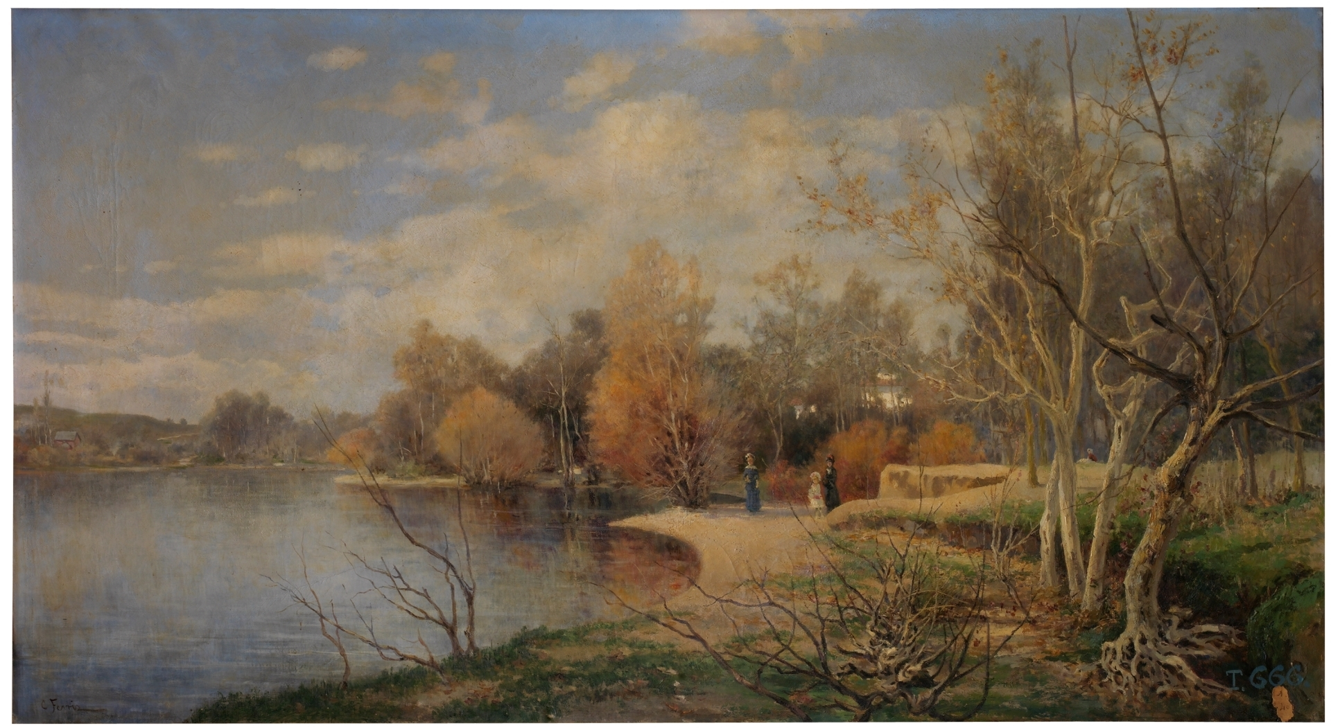 Estanque de la Casa de Campo (1884), de Cristóbal Ferriz Sicilia. Óleo sobre lienzo, 55 x 100 cm. Museo del Prado, Madrid, España